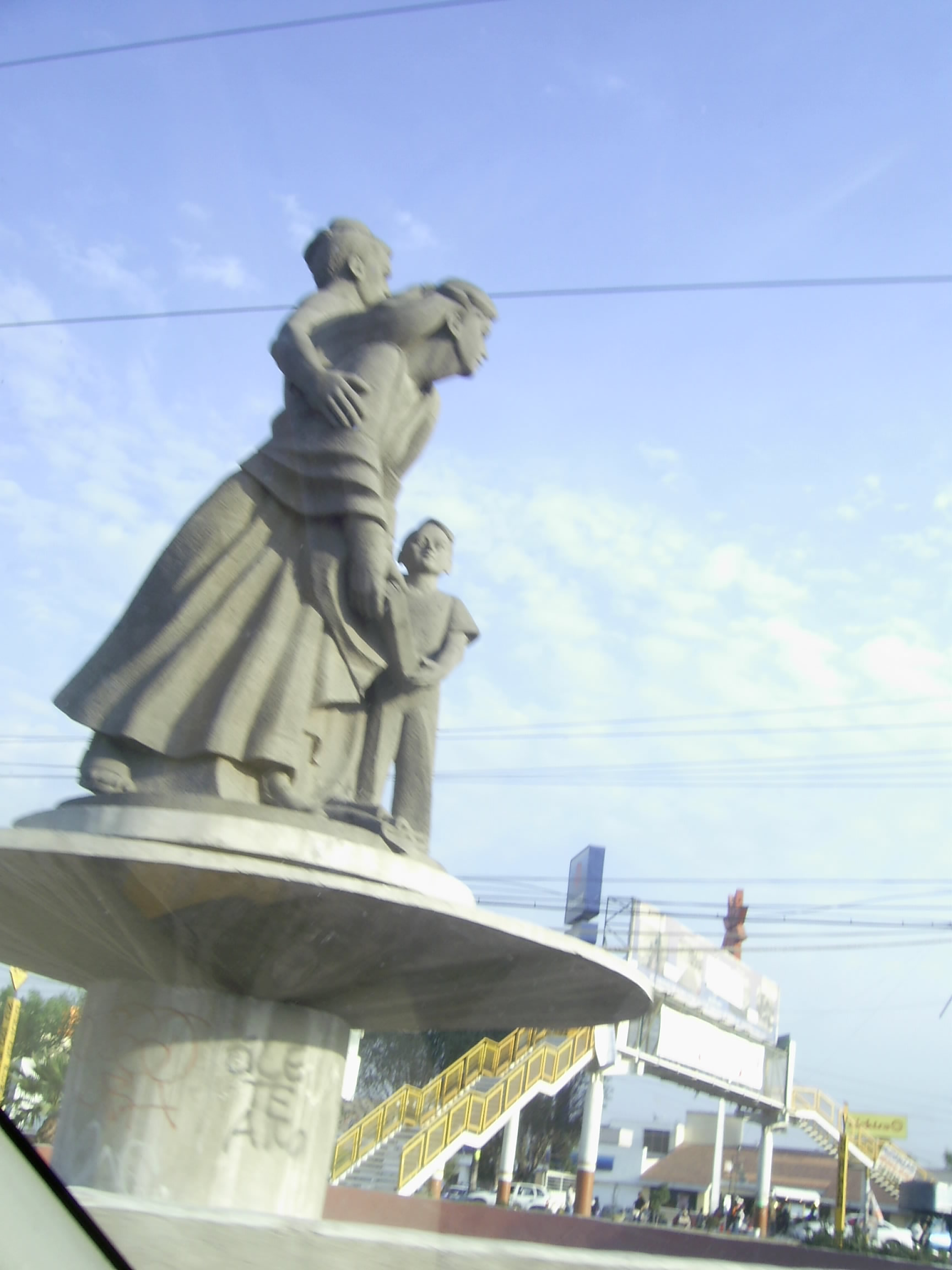 Entrada de Jardines de Morelos